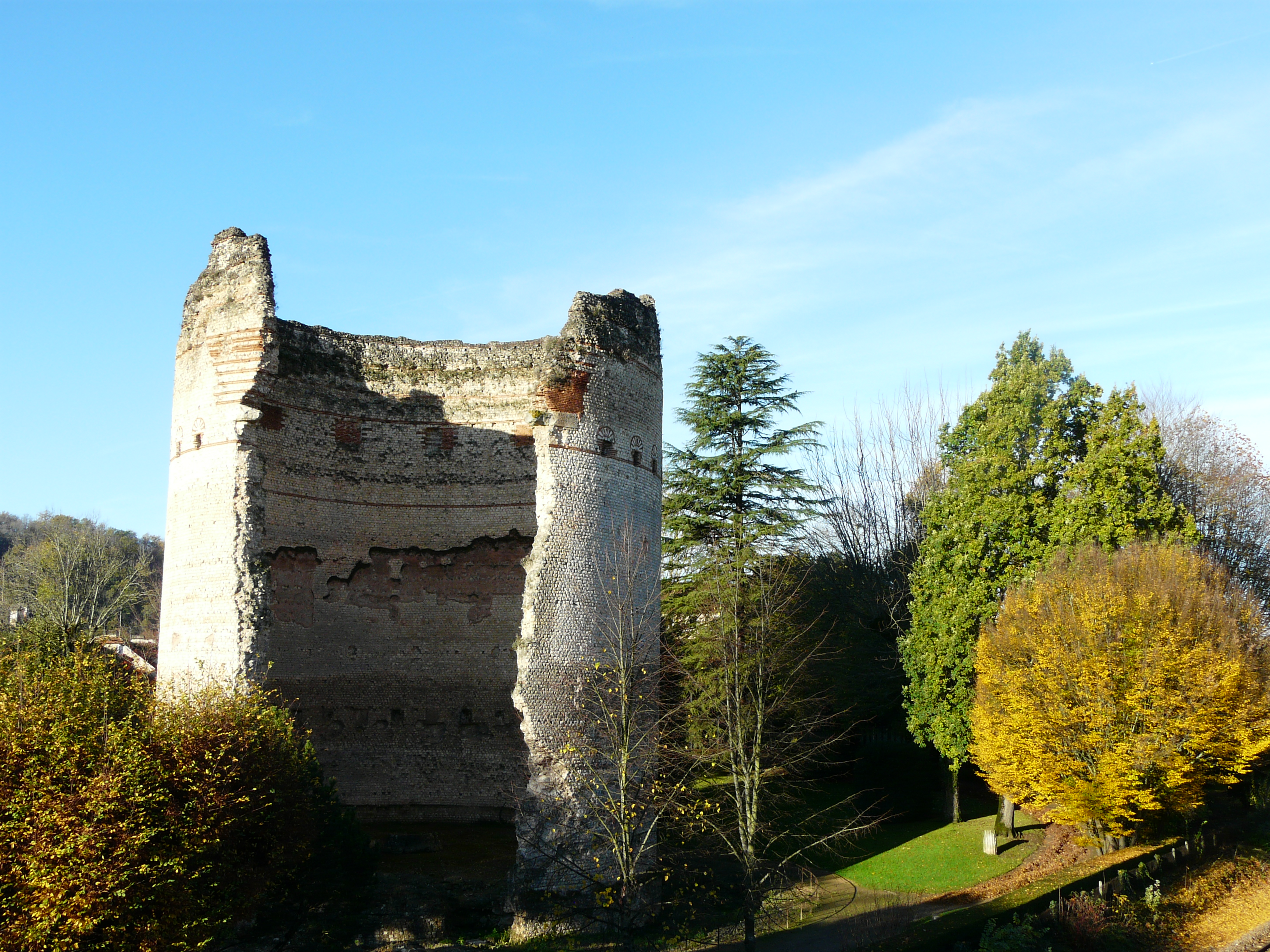 La tour de Vésone, Périgueux, Dordogne, France.